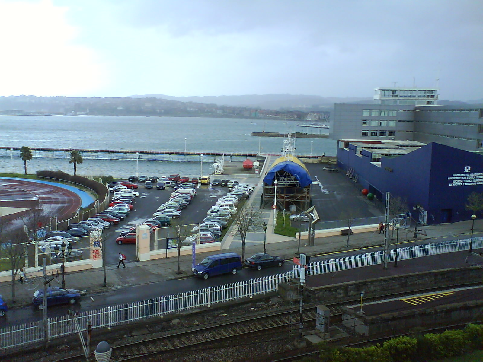 Santurtzi Peñota auzoaren behealdea / Parte baja del barrio de Peñota en Santurtzi